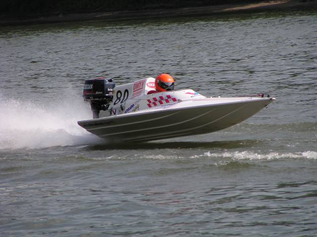 eigenes Foto